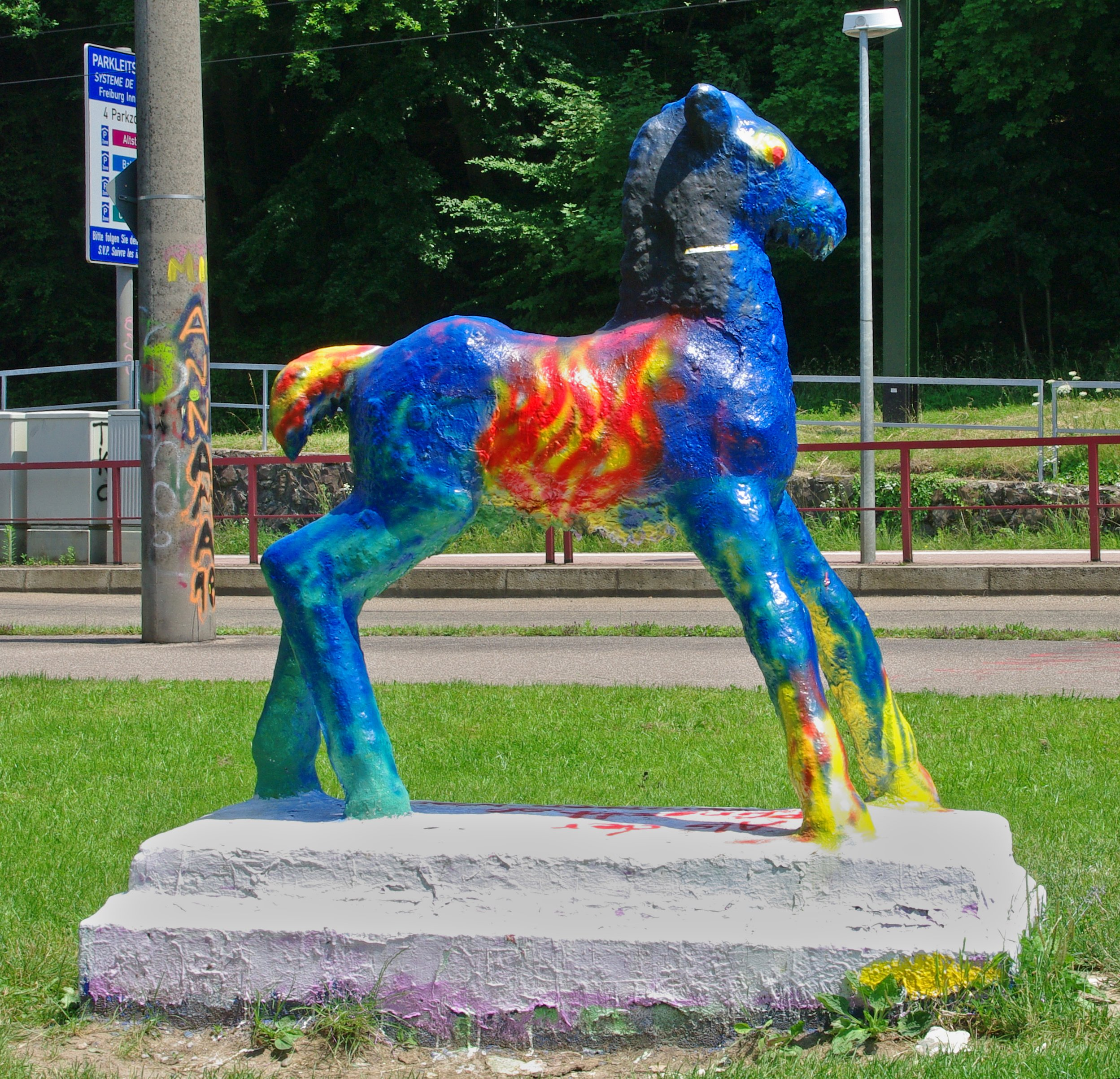 Das Holbeinpferdle am 26.06.2010